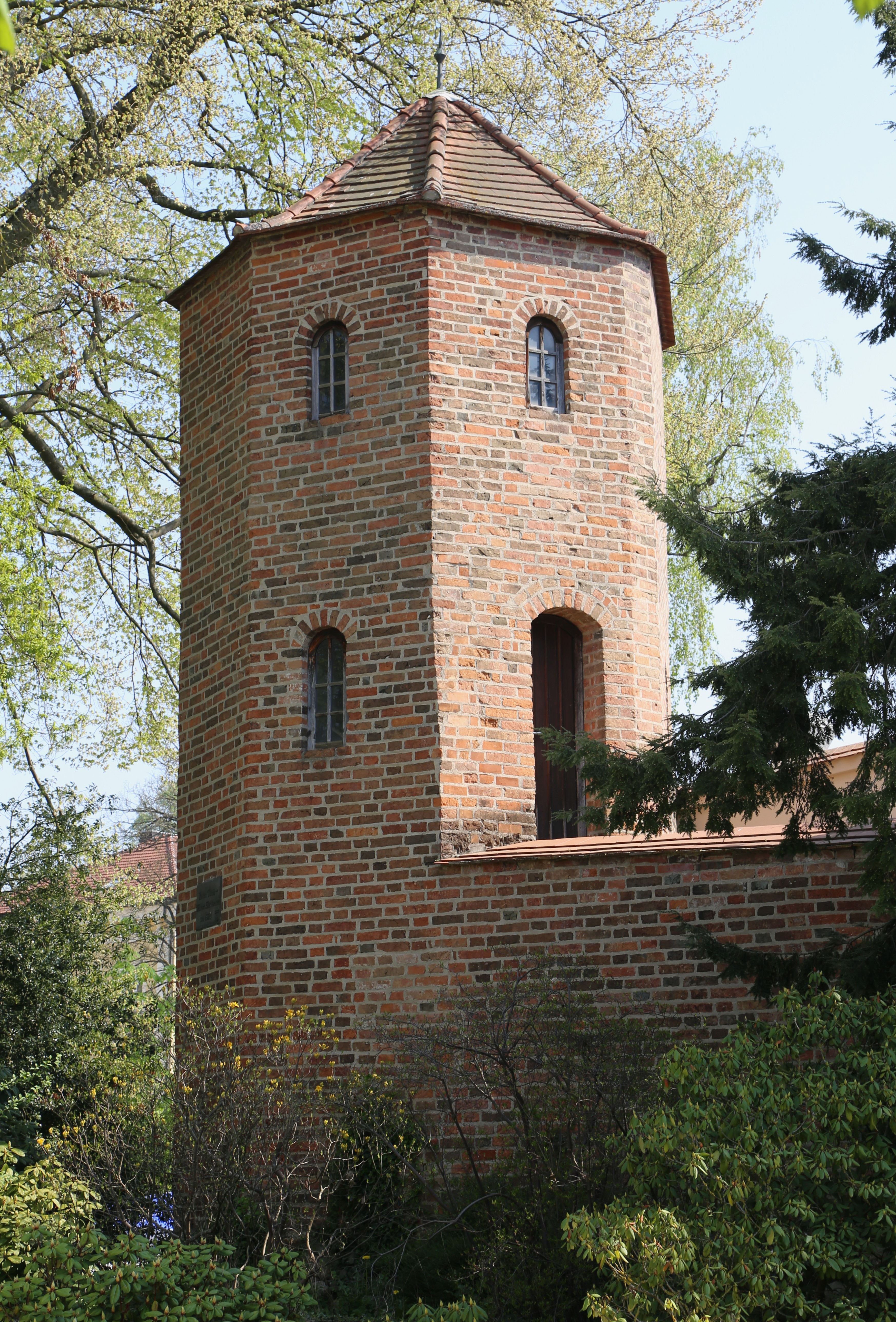 Feuerwehrgasse 1a; Lindnerstraße 14, Pfarrkirchen; Reststück der Befestigungsmauer mit polygonalem Eckturm, Mitte 16. Jahrhundert